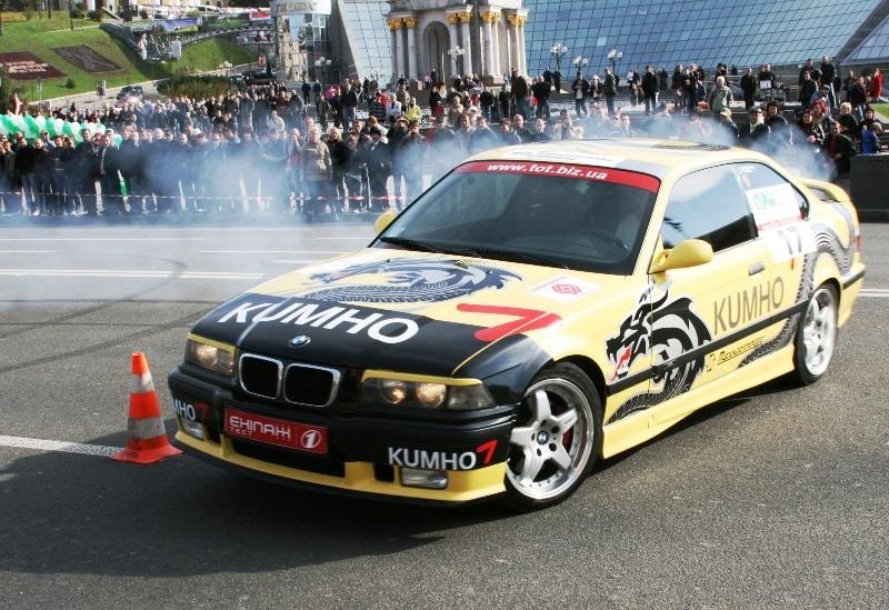 Ралі журналістів на Майдані Незалежності (Київ, 2008. Фото Сергія Шевченка)